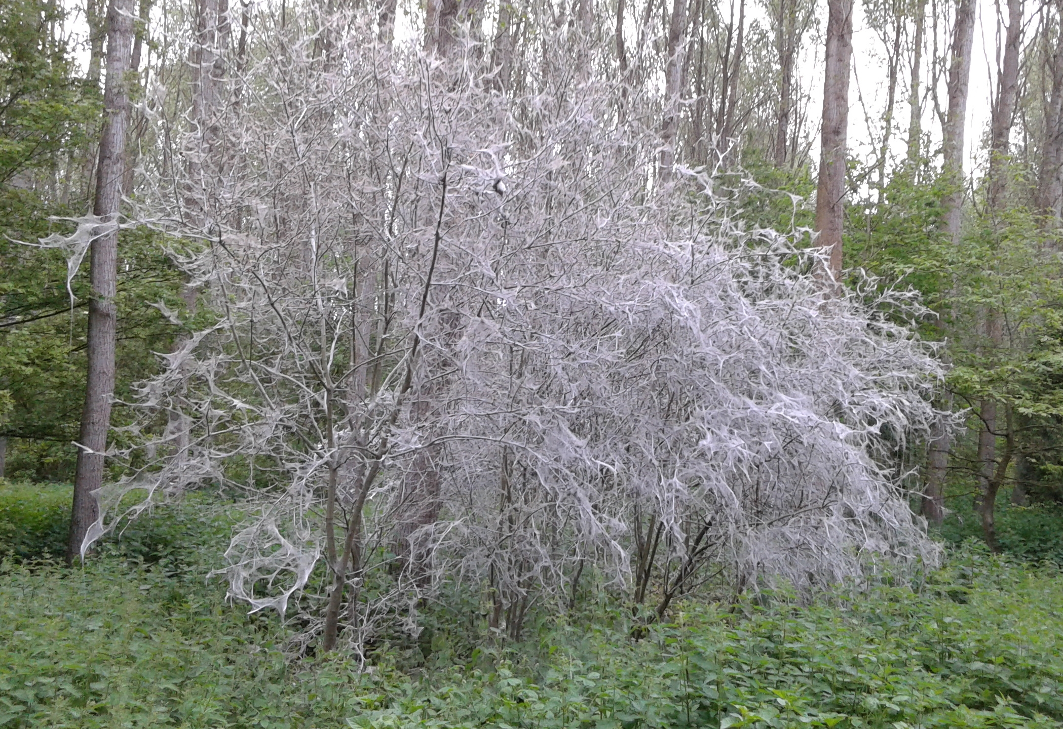 Grand hyponomeute du fusain (Yponomeuta cagnagella) défoliation total sur 59380